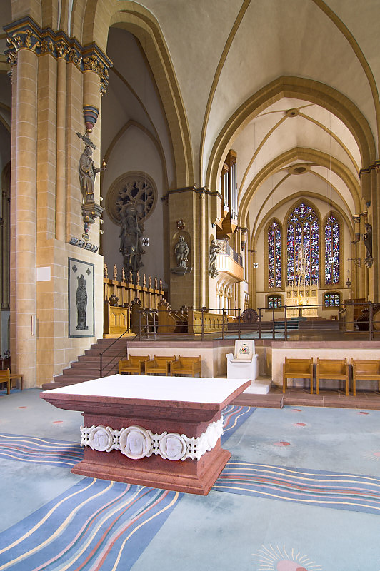 Blick in den Altarraum des Paderborner Domes